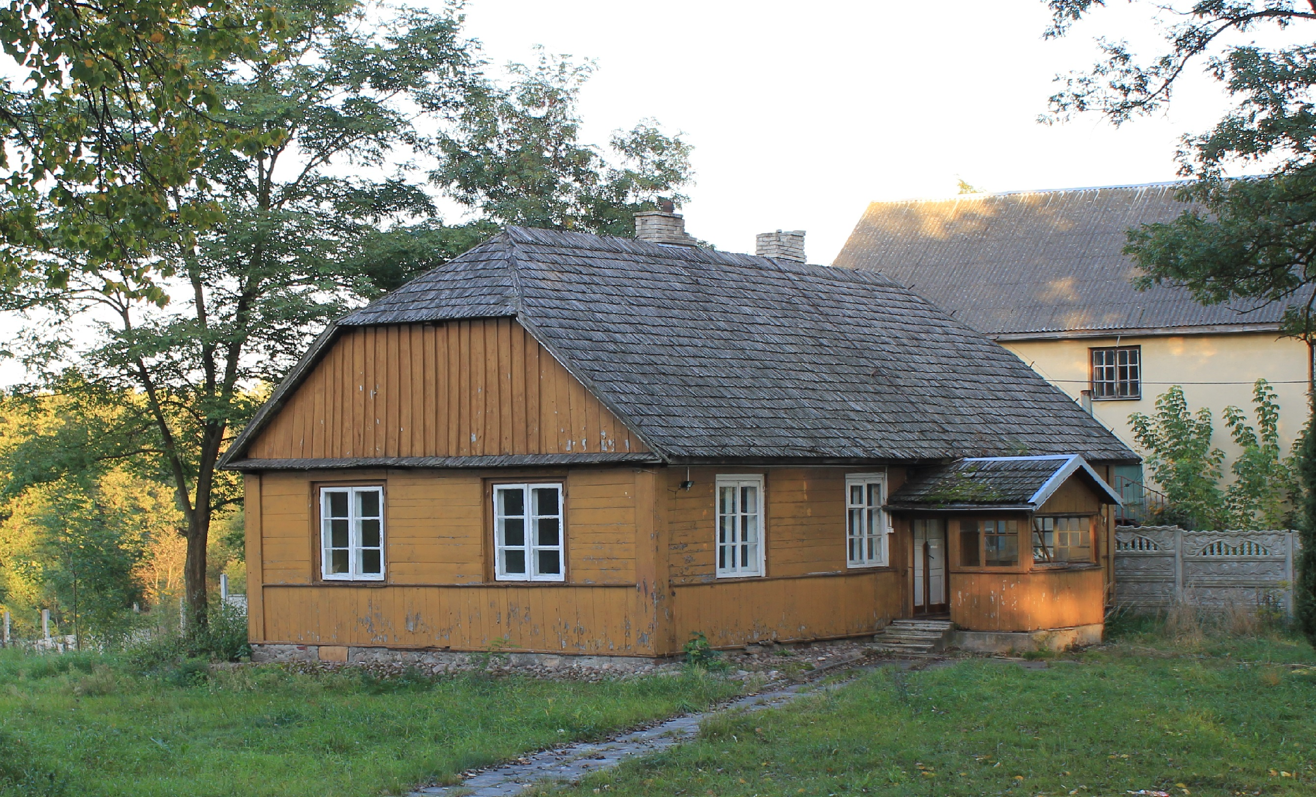 Kuflew, organistówka (nr 9), pocz. XX Nr ID zabytku 621831